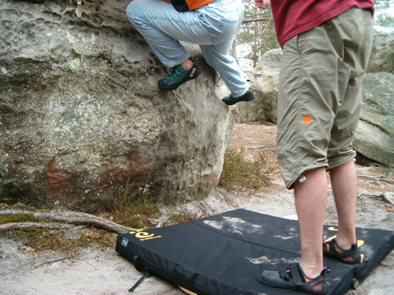 Gebruik van een bouldermat in Fontainebleau